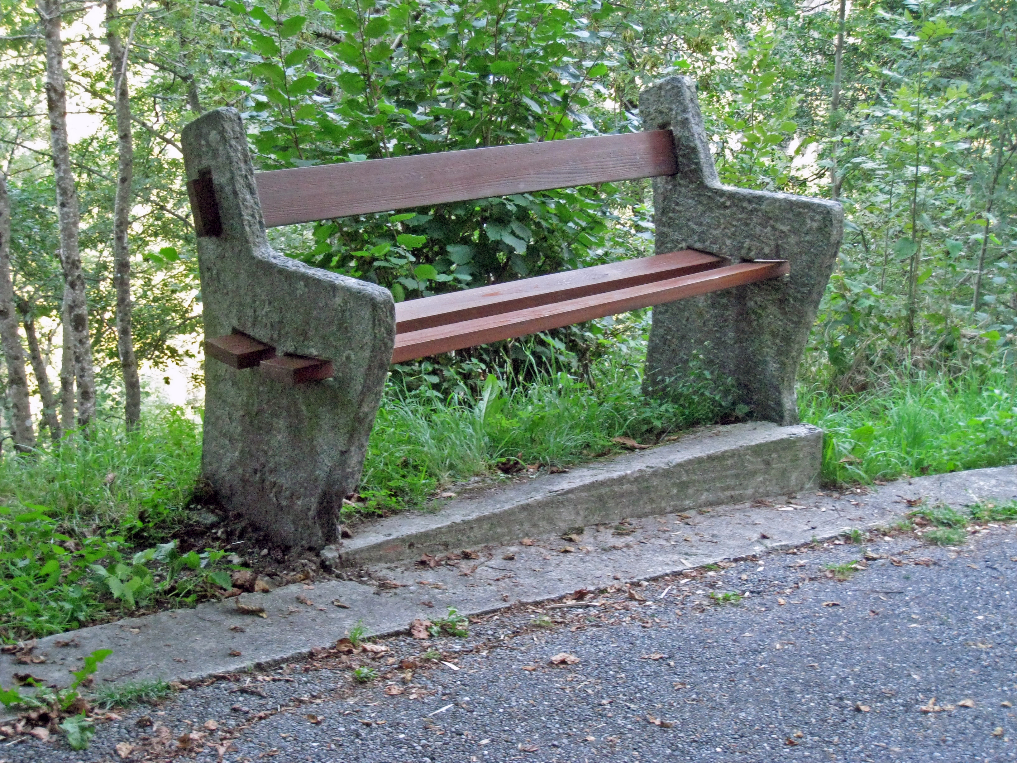 Bagni di Craveggia: Sitzbank auf dem Weg nach Spruga